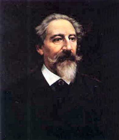 Ferdinand II. (1816-1885)